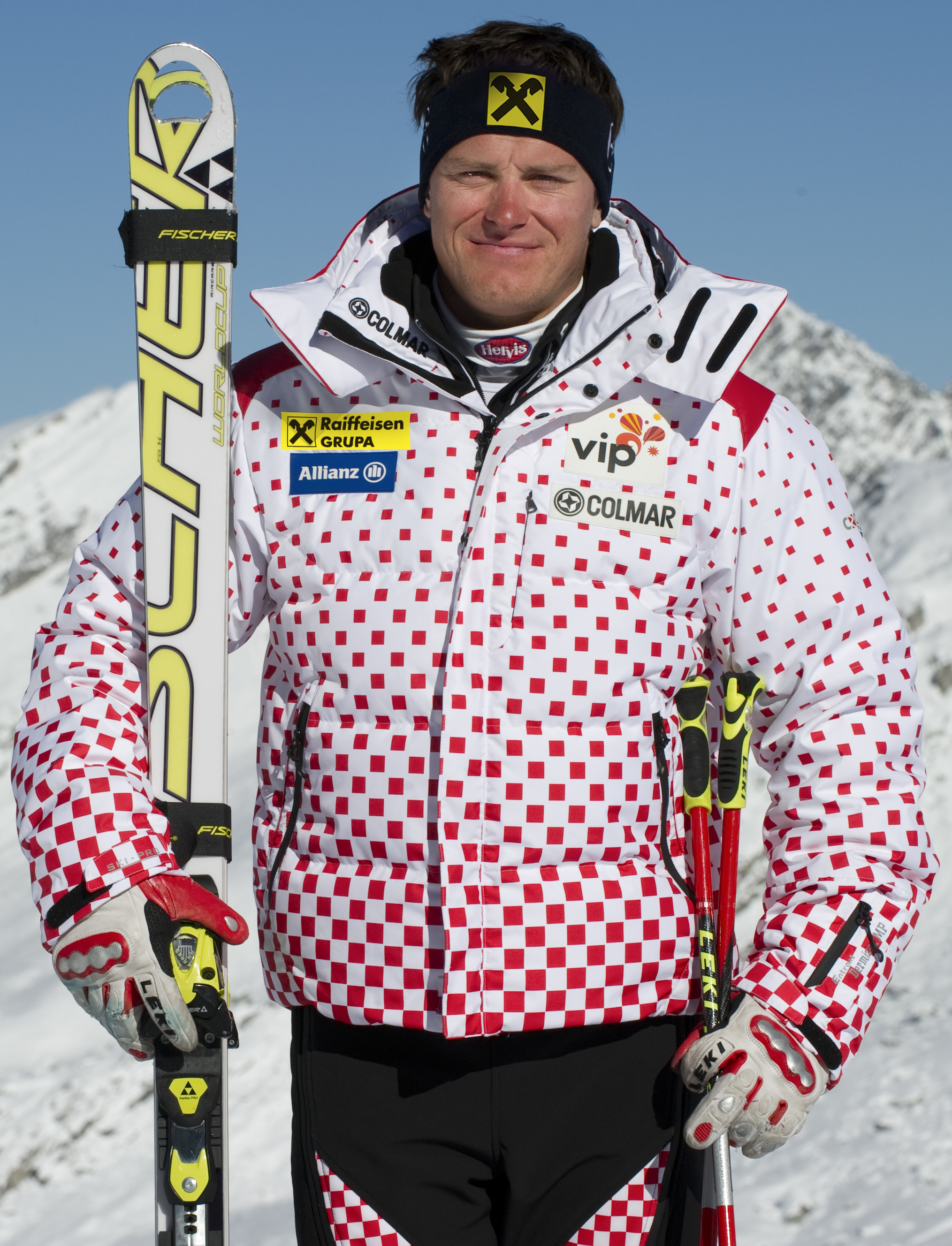 Ivica Kostelić